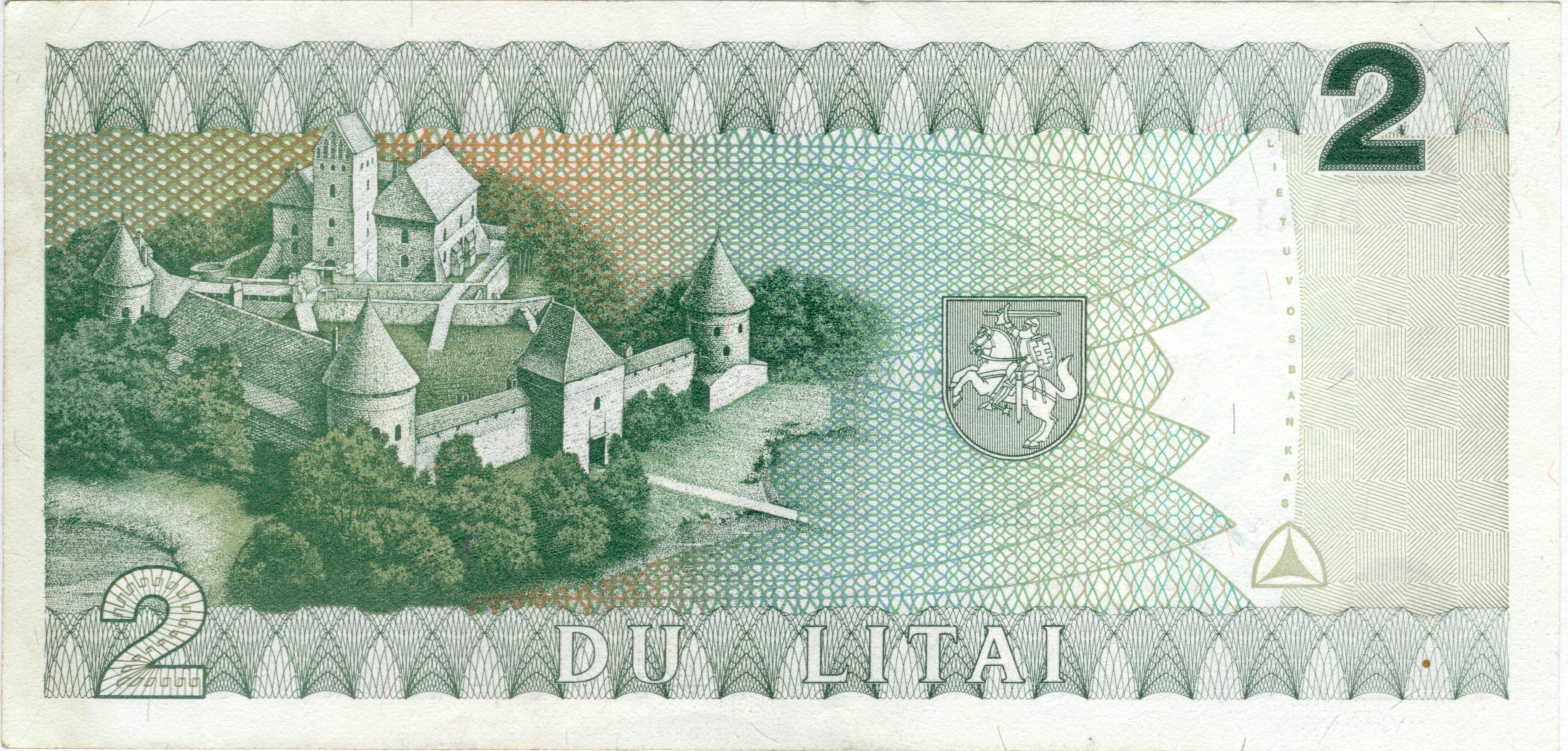 2 litas banknote